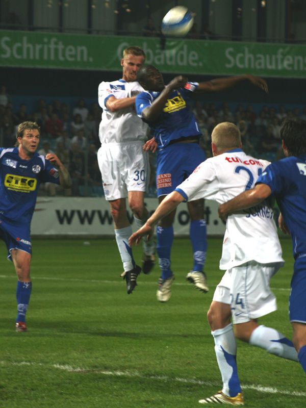 Hannu Tihinen, FCZ, Hardturm Stadion (Schweiz), Pokal Halbfinale, FC Zürich - FC Luzern 2:3